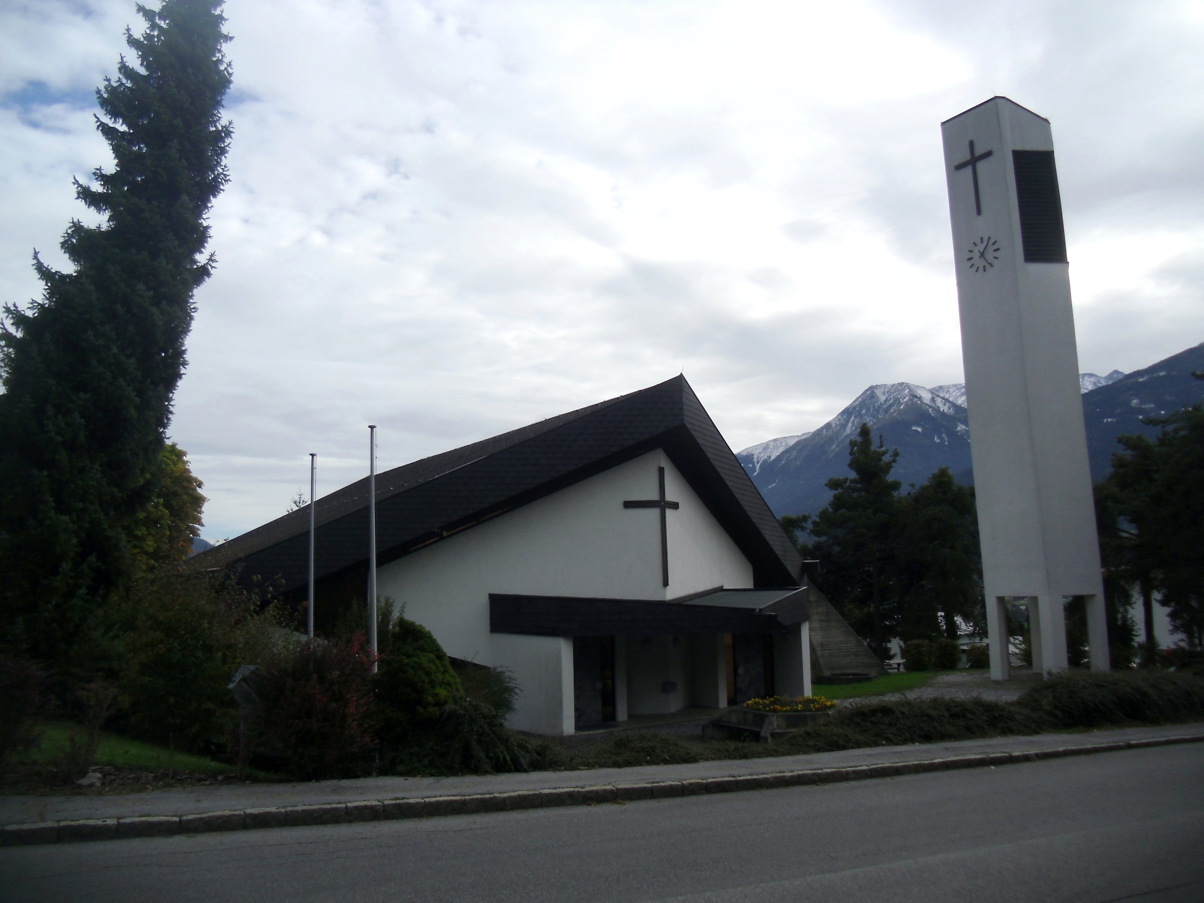 Kath. Filialkirche, Auferstehungskirche